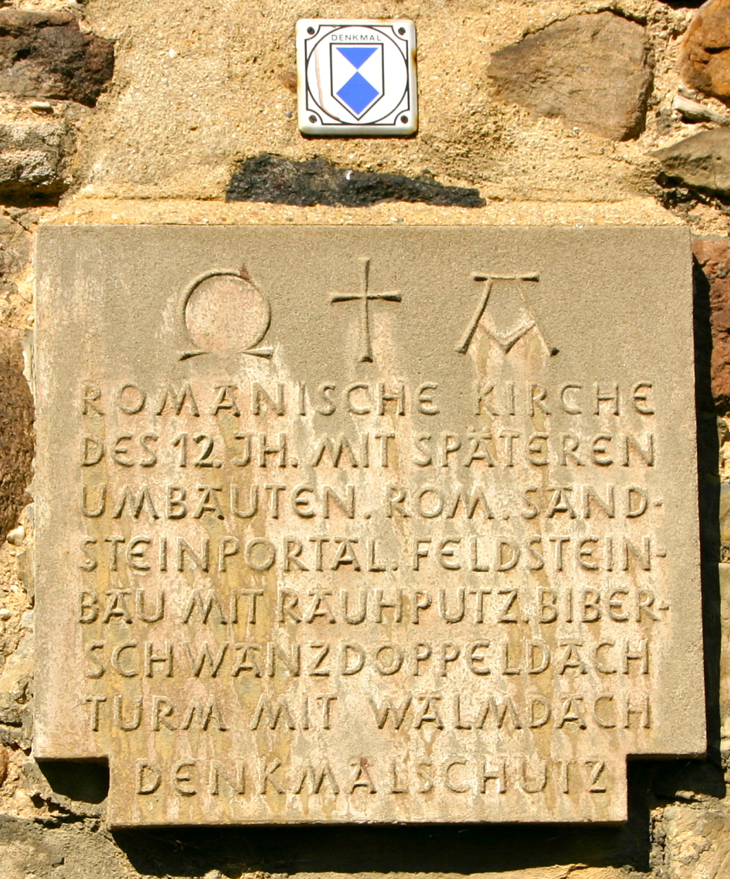 Scheuder ist ein Teil der Stadt Südliches Anhalt in Sachsen-Anhalt.